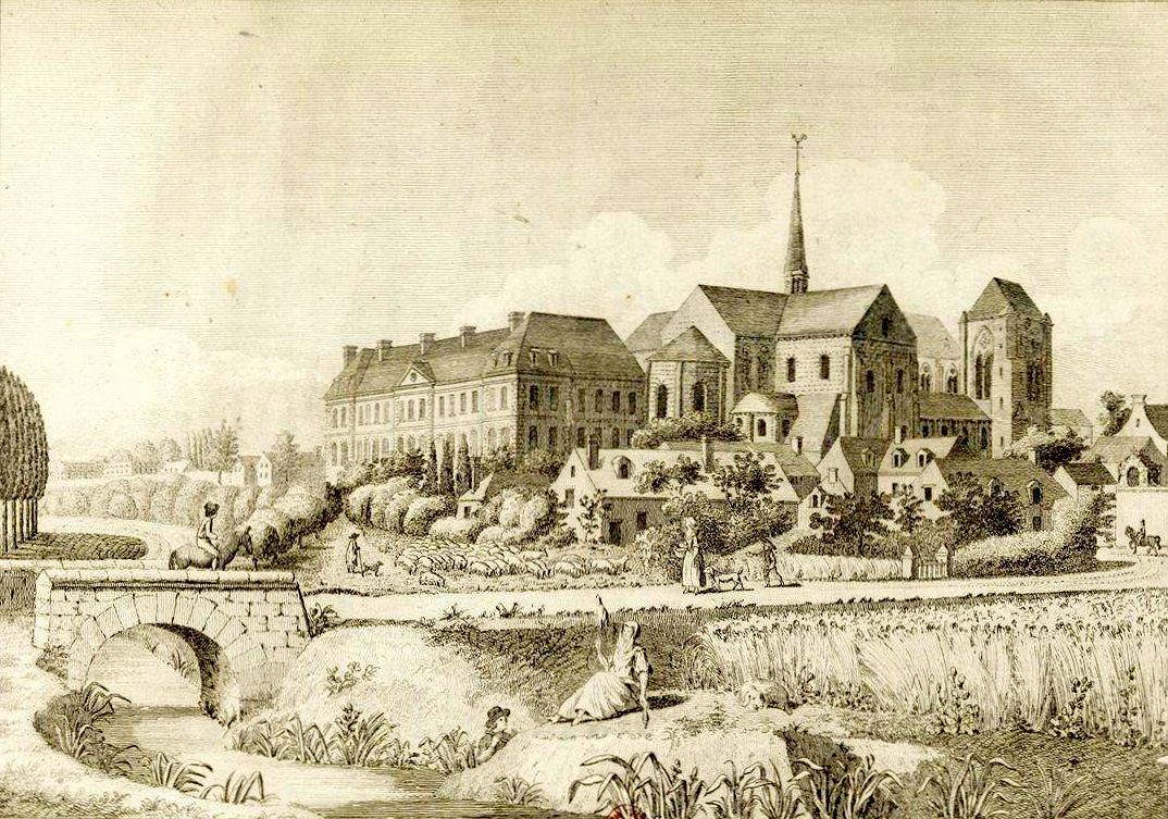 Vue d'ensemble depuis le nord-est.